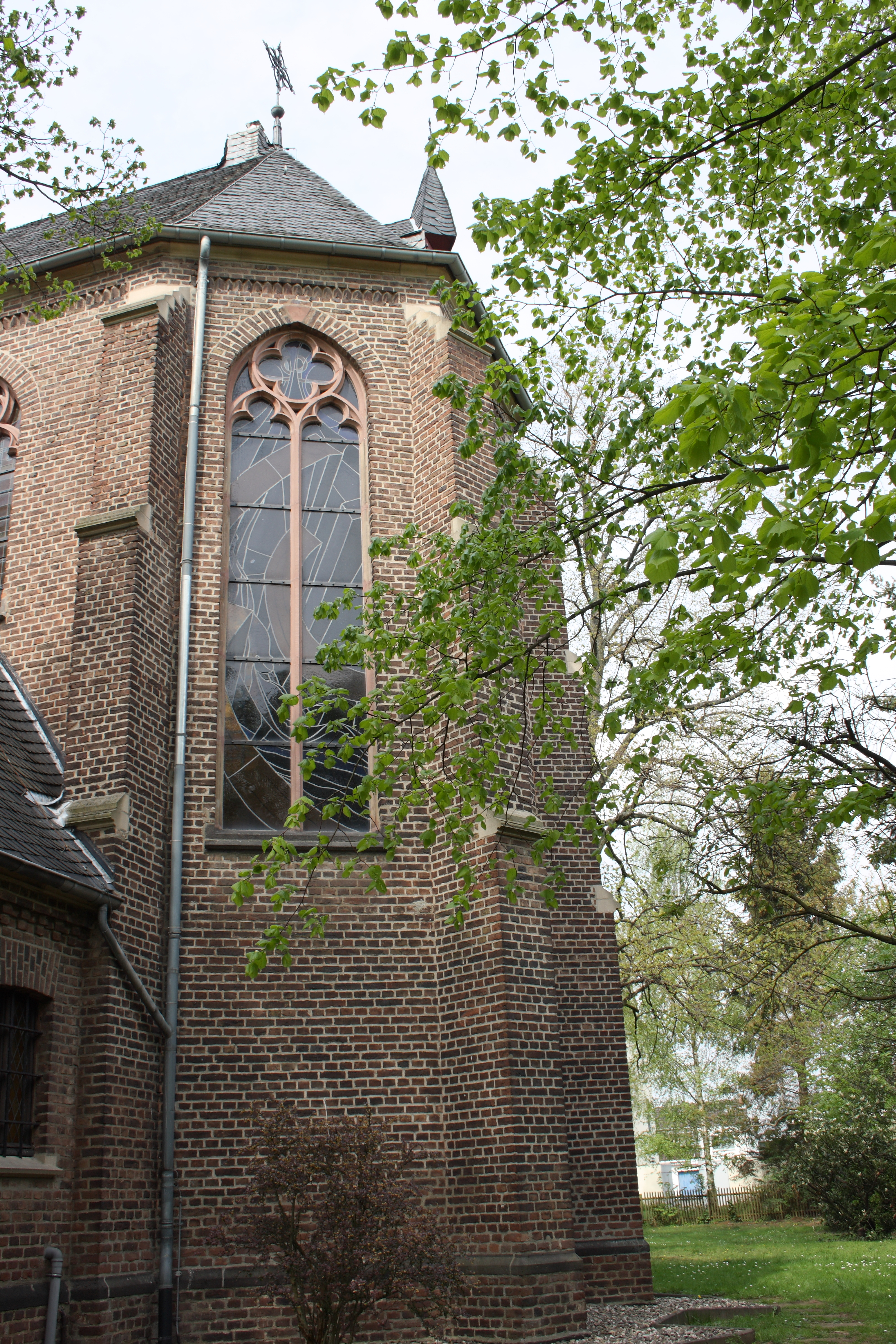 katholischen Pfarrkirche St. Brictius in Euenheim